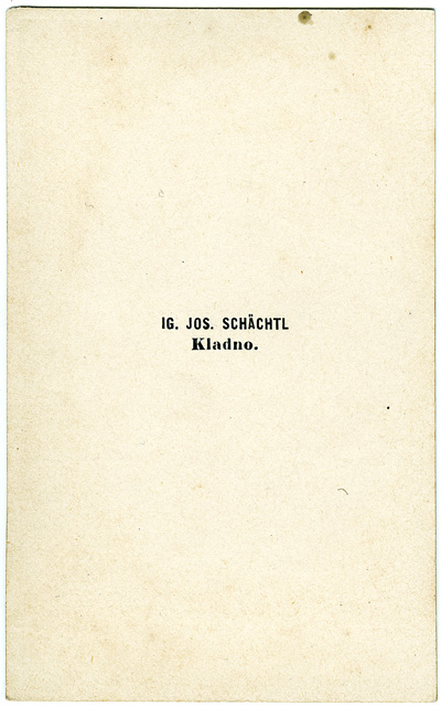 Zadní strana autoportrétu Ignáce Šechtla z roku 1864